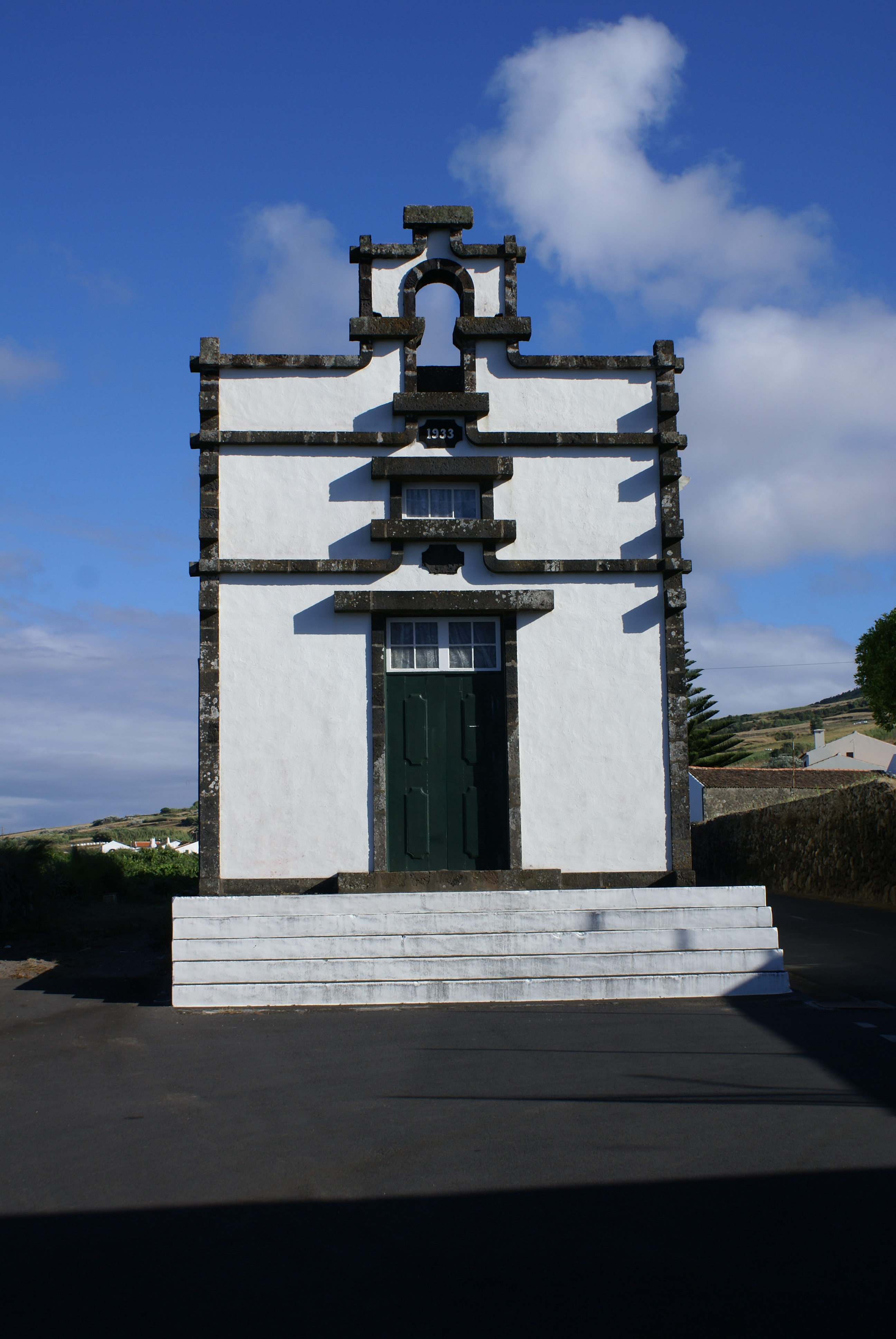 Ermida de Nossa Senhora dos Remédios, Fenais, Vila da Praia, Santa Cruz da Graciosa, ilha Graciosa, Açores, Portugal